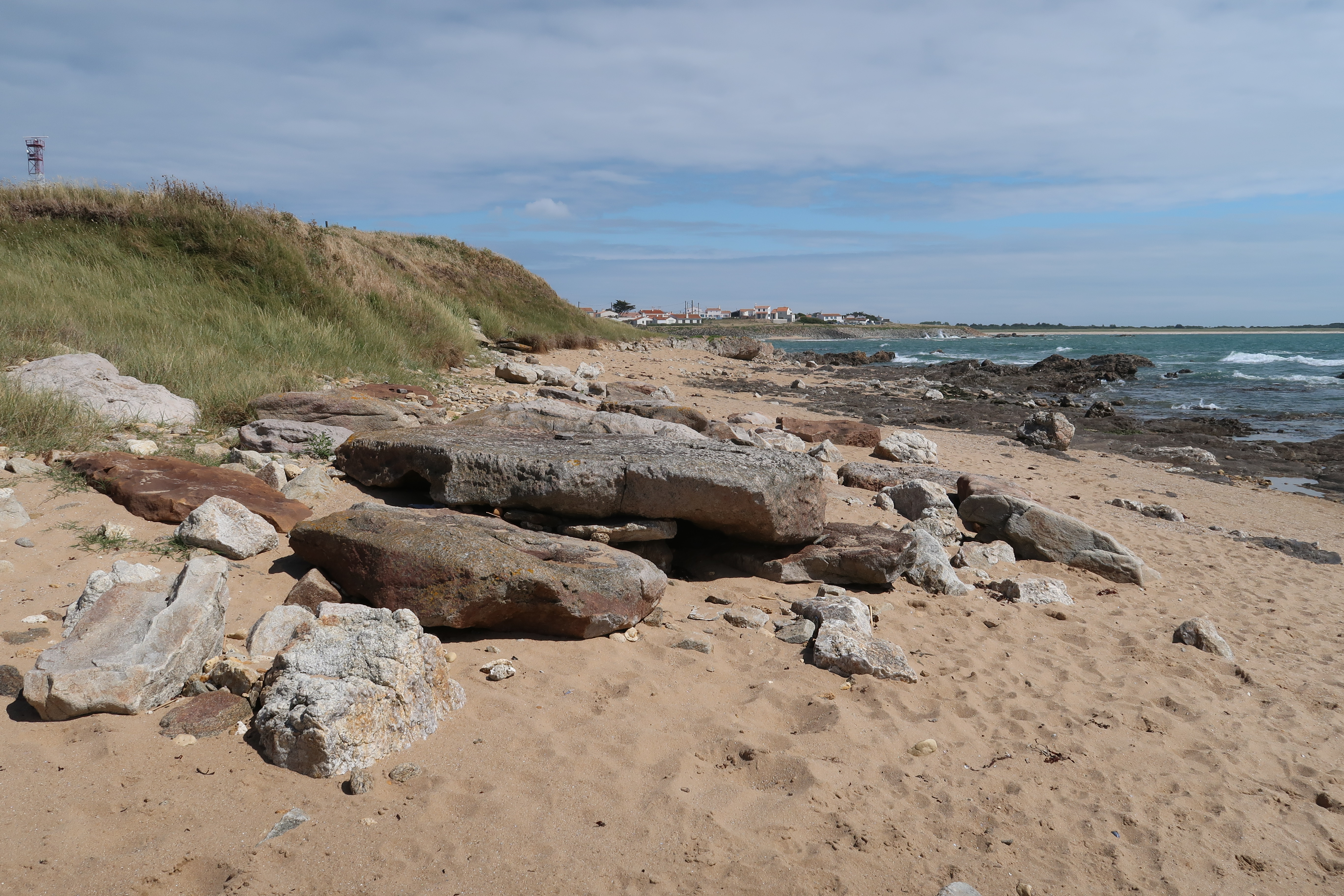 Dolmen dégradé situé à la pointe de l'Herbaudière.